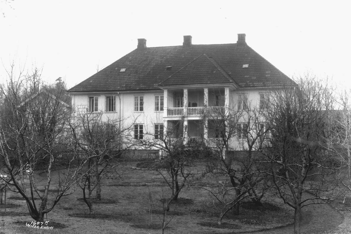 Grimelund gård, våningshus, fasade sett fra hagesiden, hageanlegg. Oslo, Vindern, Grimelundshaugen.